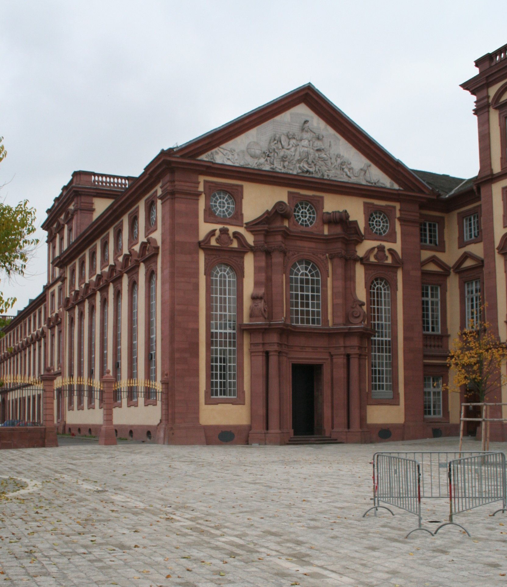 Mannheim, Schloss, ehem. Bibliothek